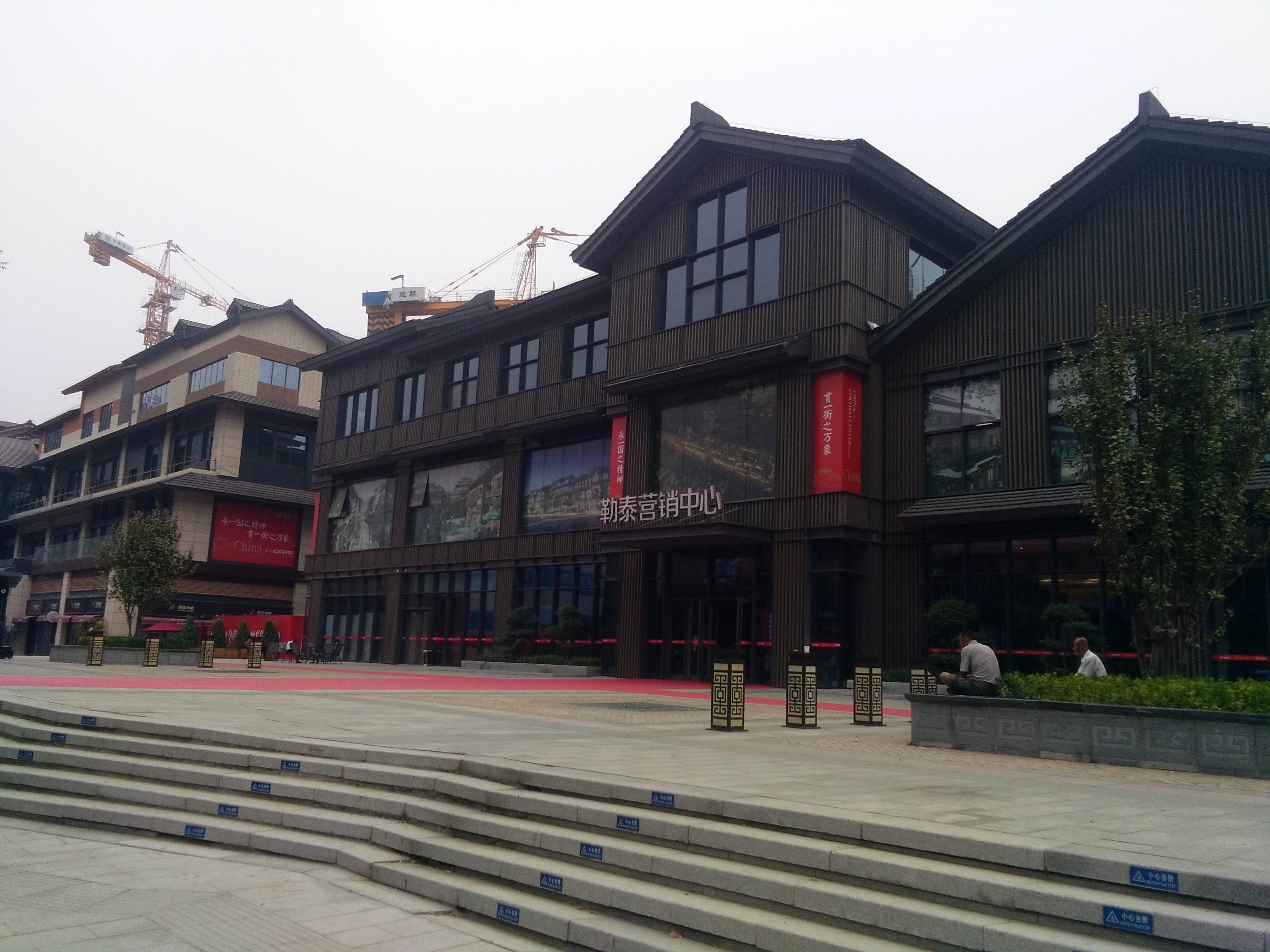 勒泰—串城街北段保护项目。